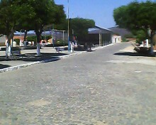 Praça de Eventos Zequinha Sanfoneiro